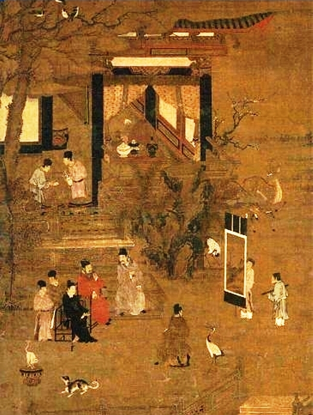 고려시대 귀족의 생활을 묘사한 고려시대 회화.